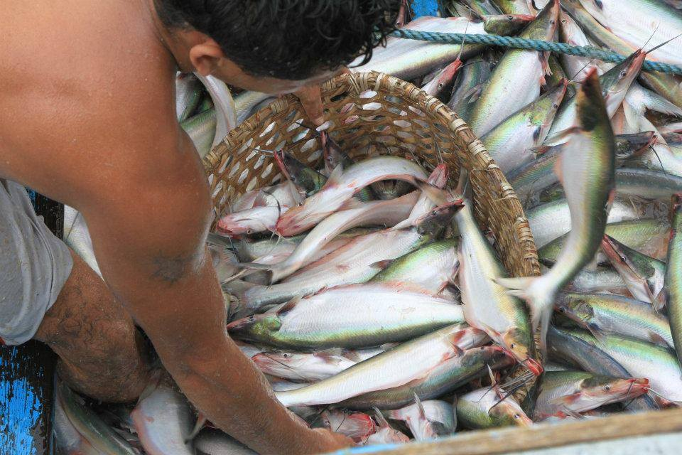 peca